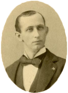 Sen W.H. Plummer